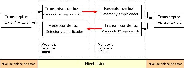 Diagrama de bloques de sistema RONJA para una enlace full dúplex. También muestra el nível de OSI para todos los componentes.